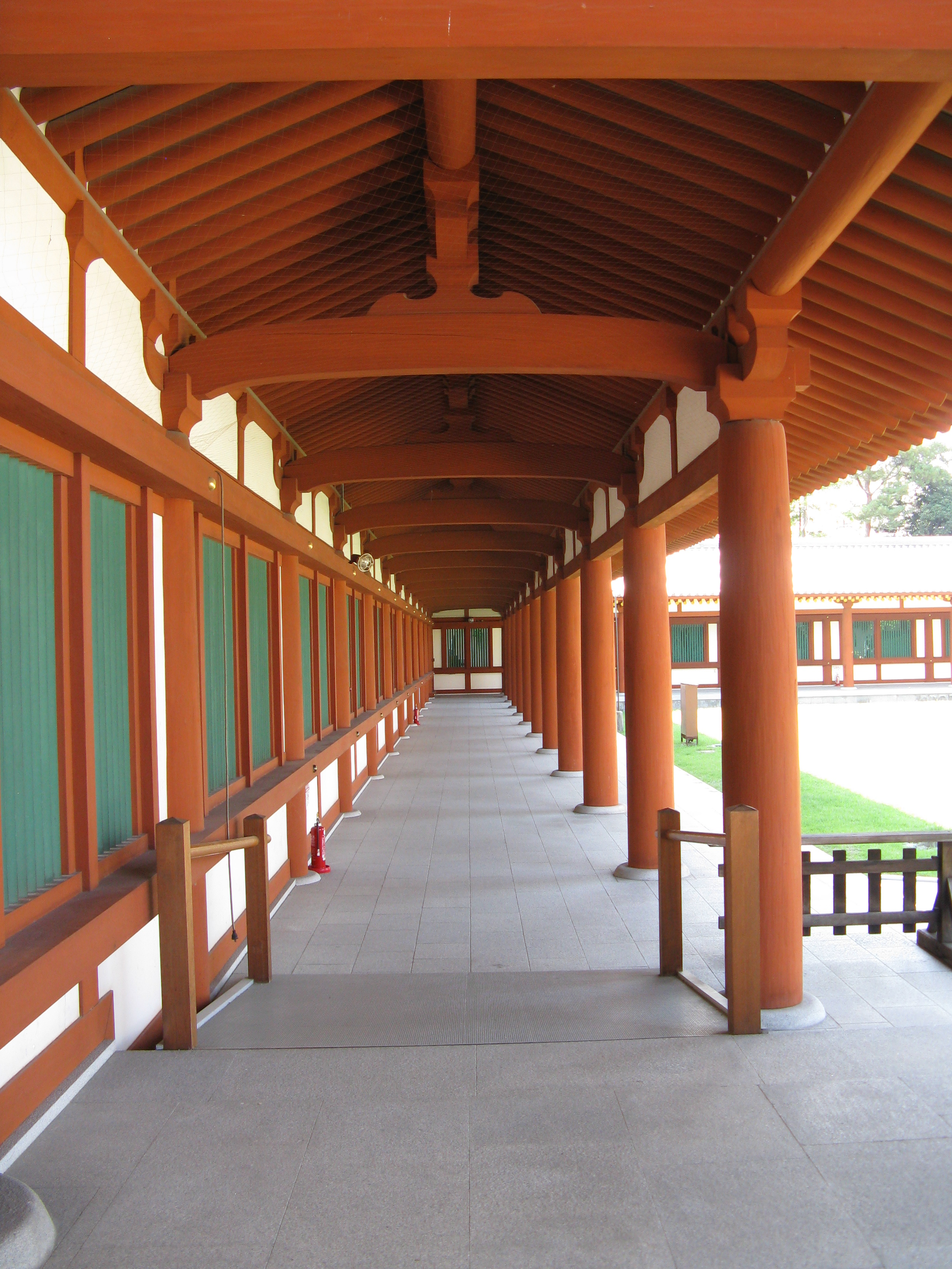 薬師寺 回廊